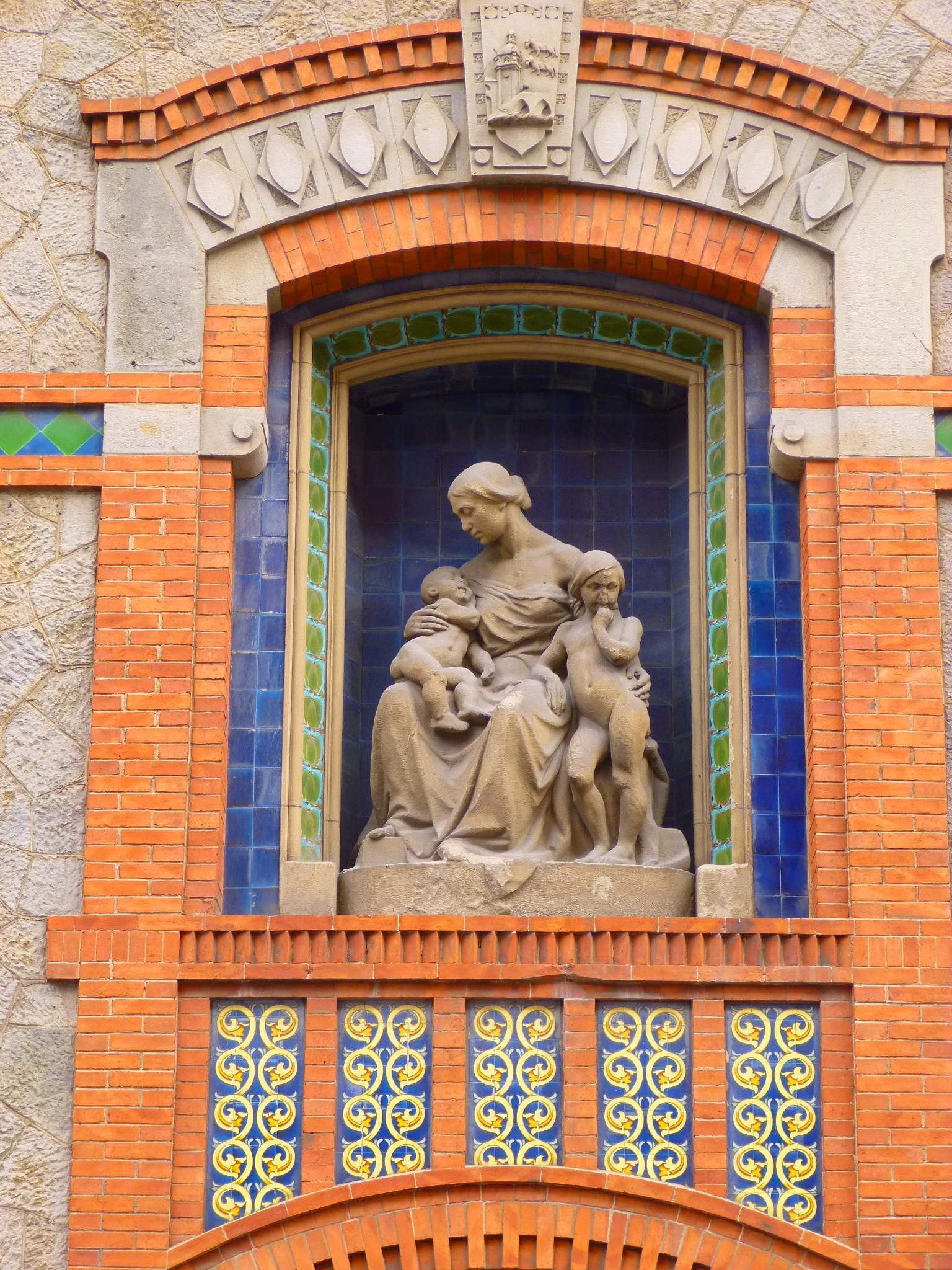 Casa cuna de Urazurrutia (Bilbao)